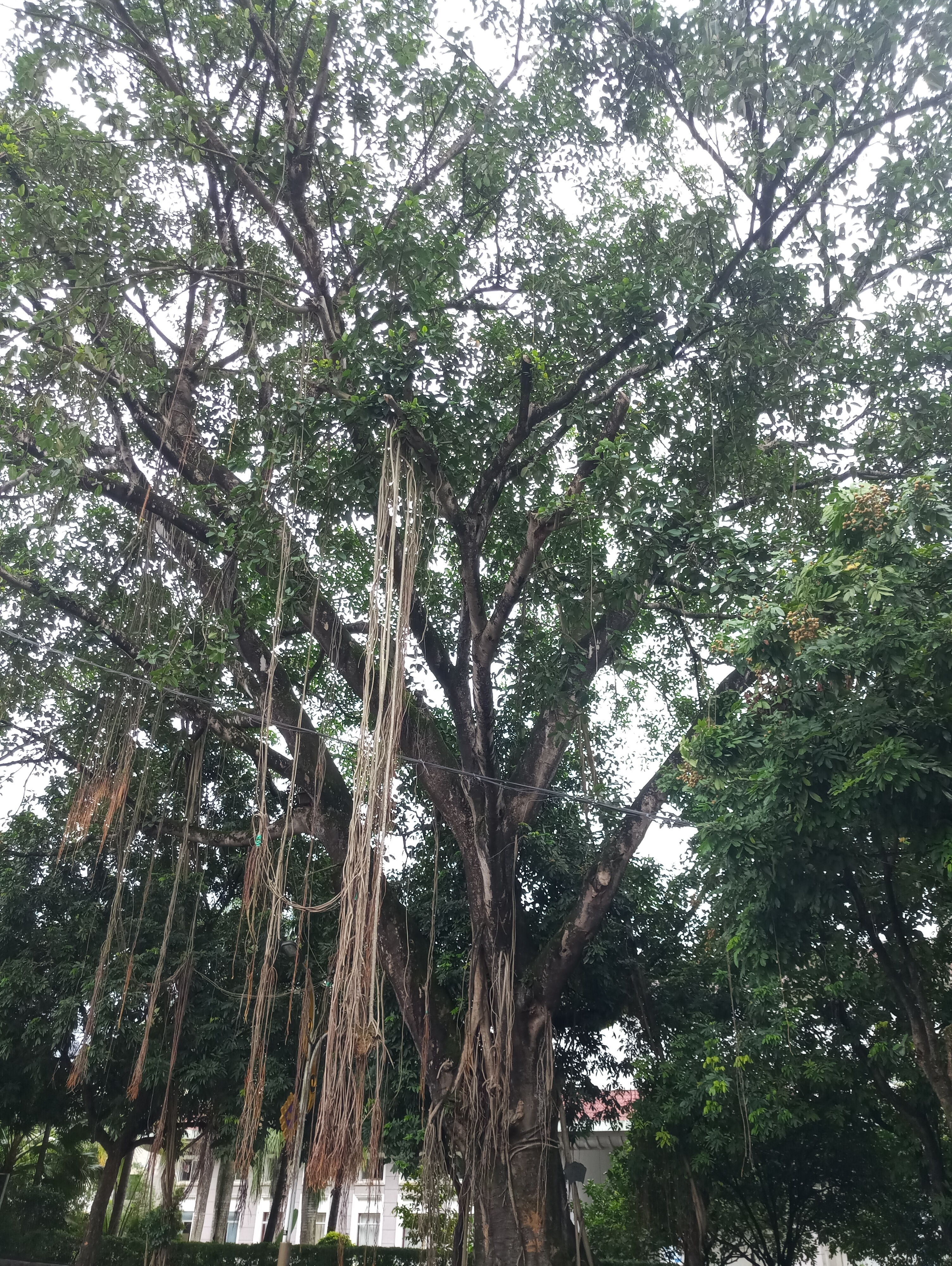 中文（中国大陆）: 芒市-班色路-榕树